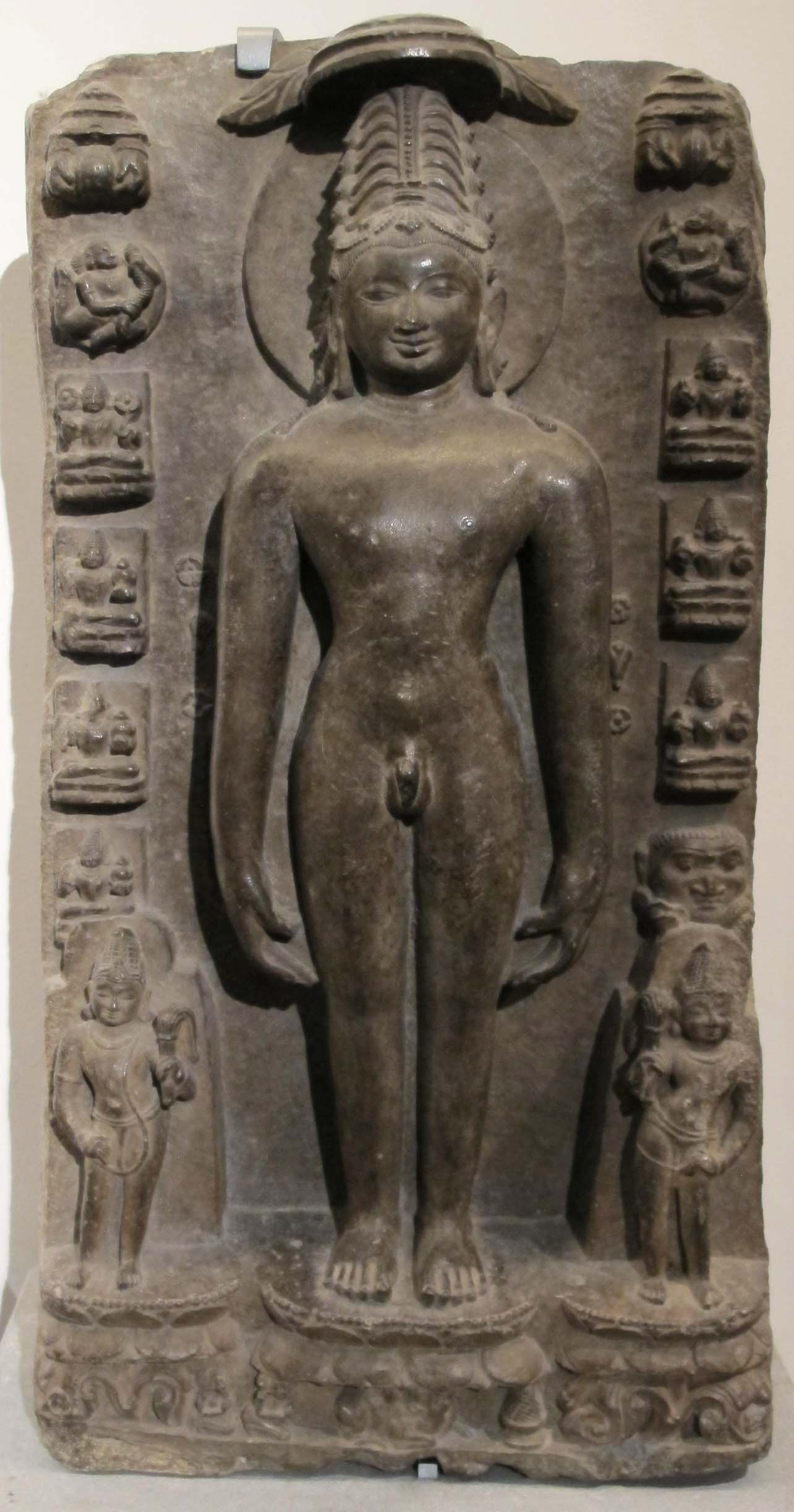 Orissa, tirthankara rishabhanatha, xi-xii sec